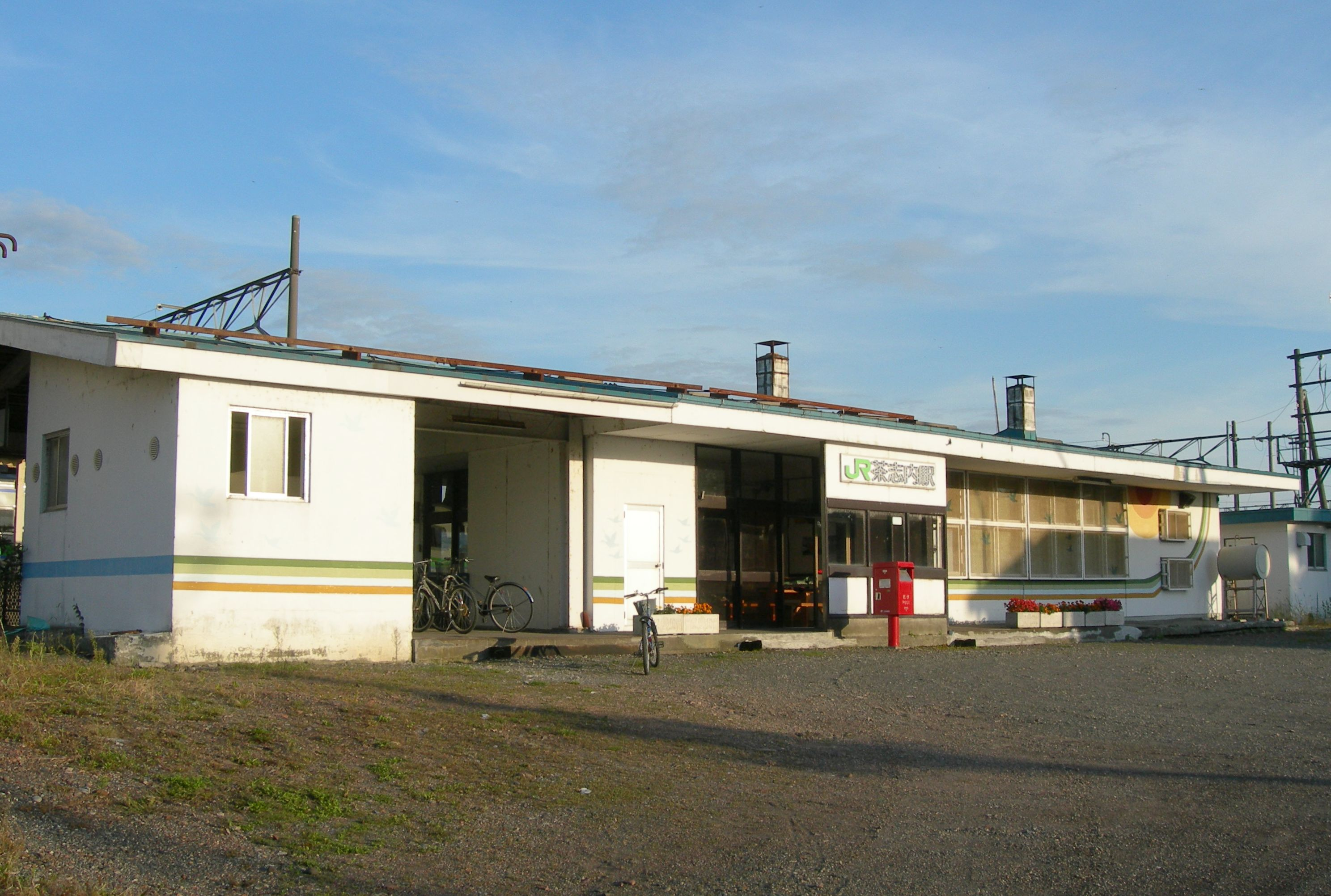 茶志内駅